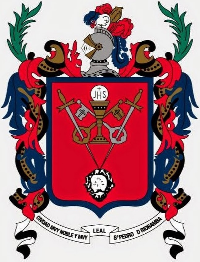 Escudo del Municipiuo de Riobamba capital de la Provincia del Chimborazo.